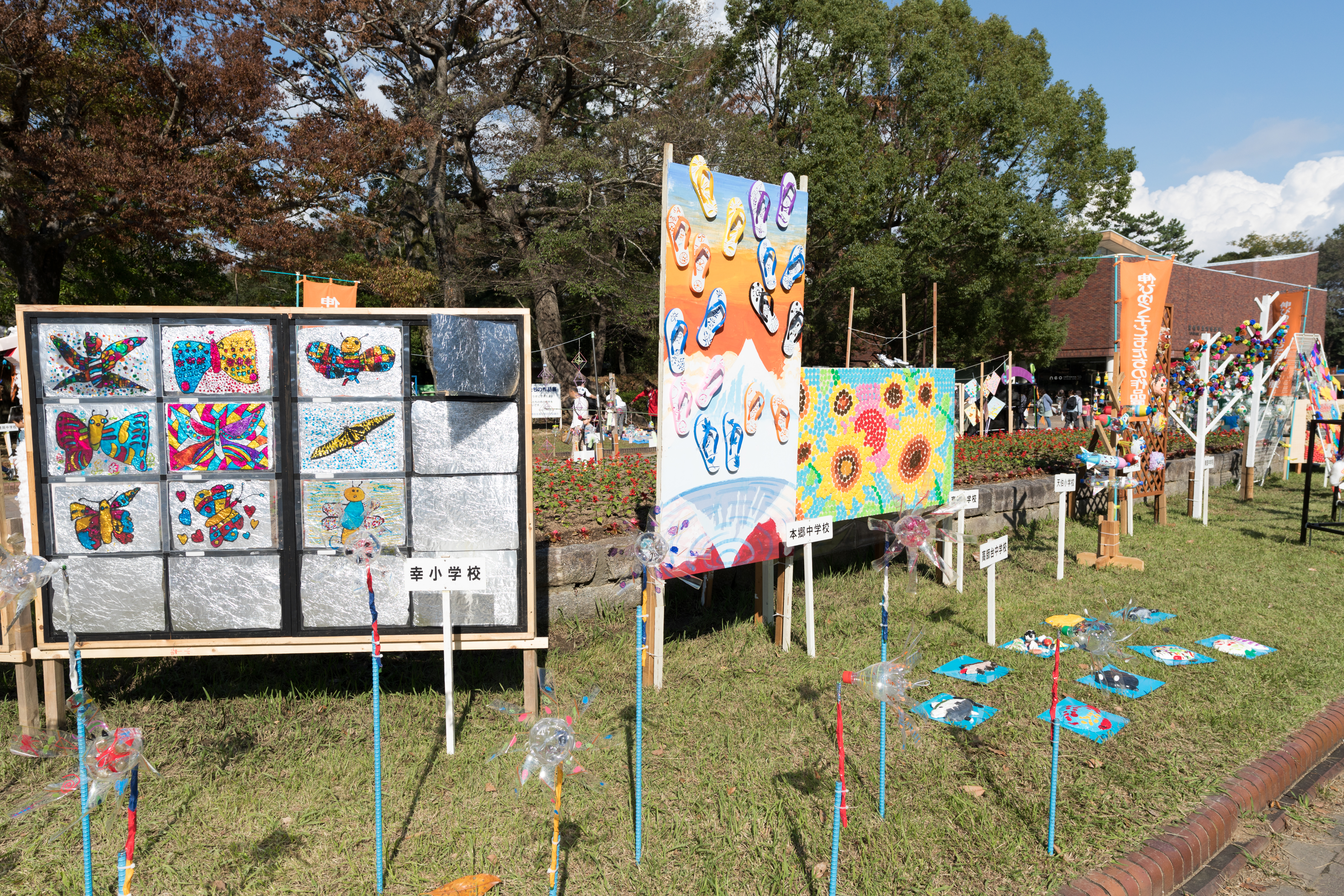 豊橋まつり2018での造形パラダイスの様子です。